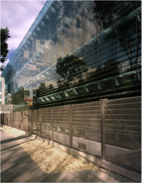 Prado Sur 250 es un edificio de oficinas sustentable ubicado en la colonia Lomas de Chapultepec de la ciudad de México.